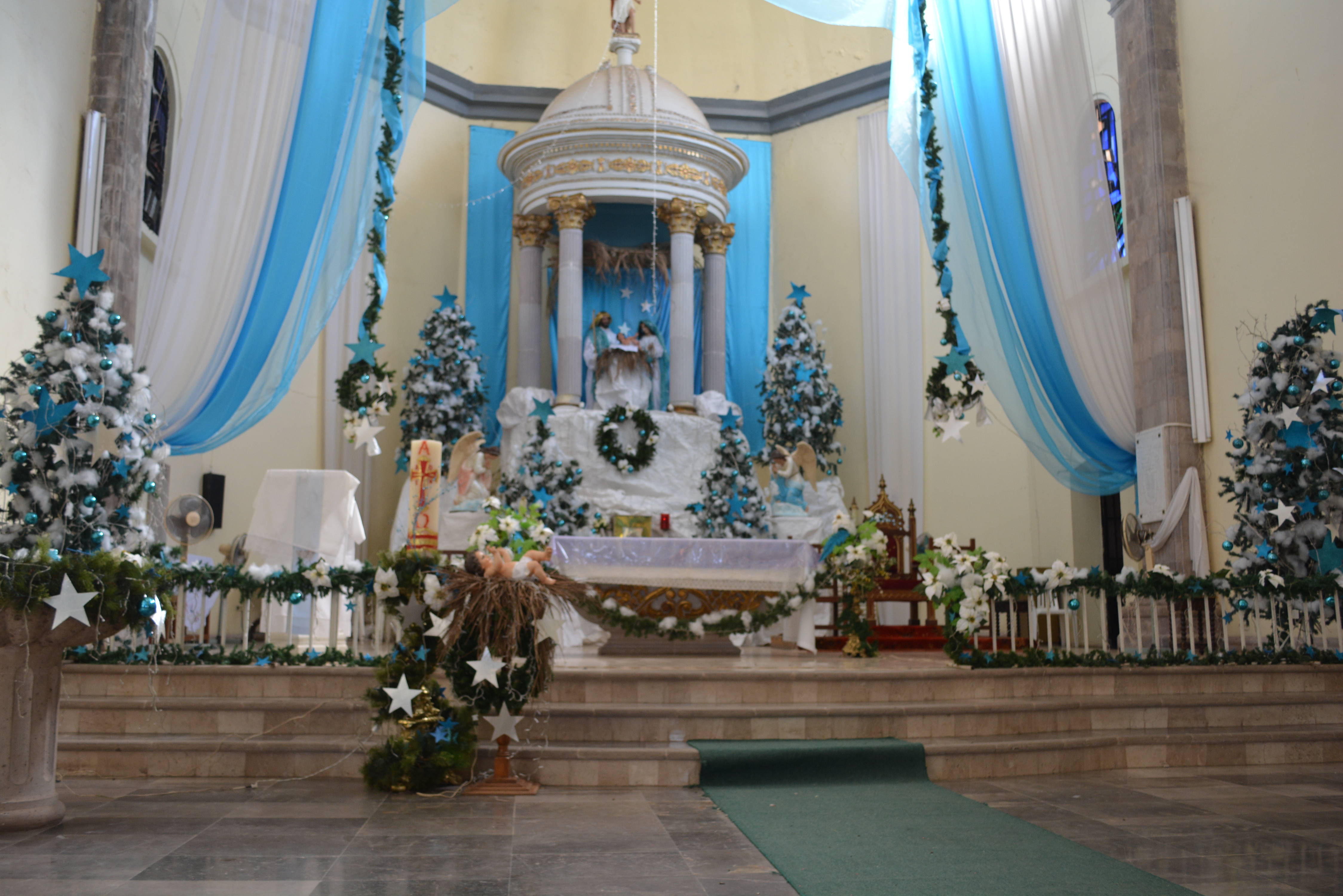 interior de la catedral de Cd. Atamirano, gro.